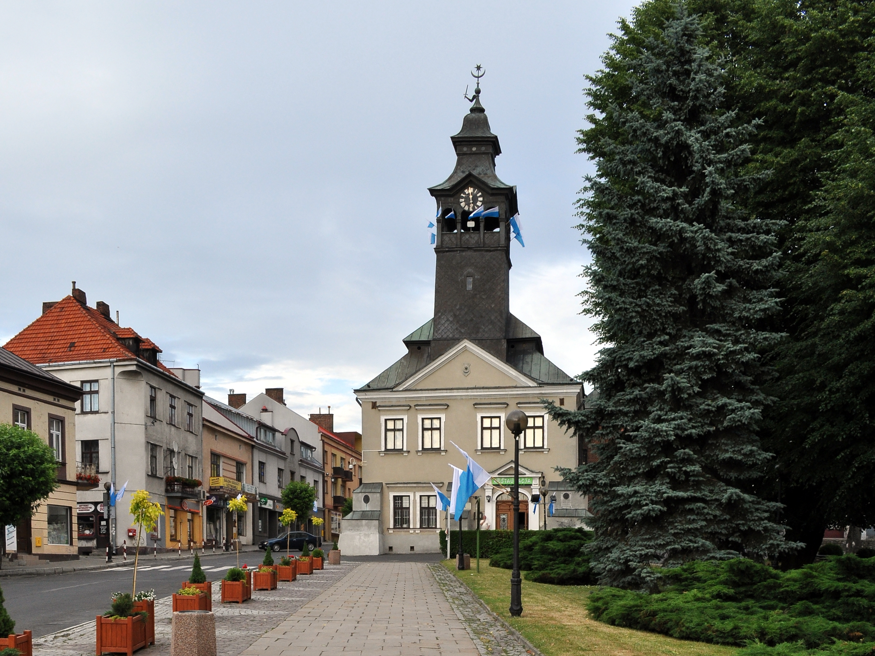 ratusz w Przeworsku (ta wieża jest naprawdę taka krzywa)